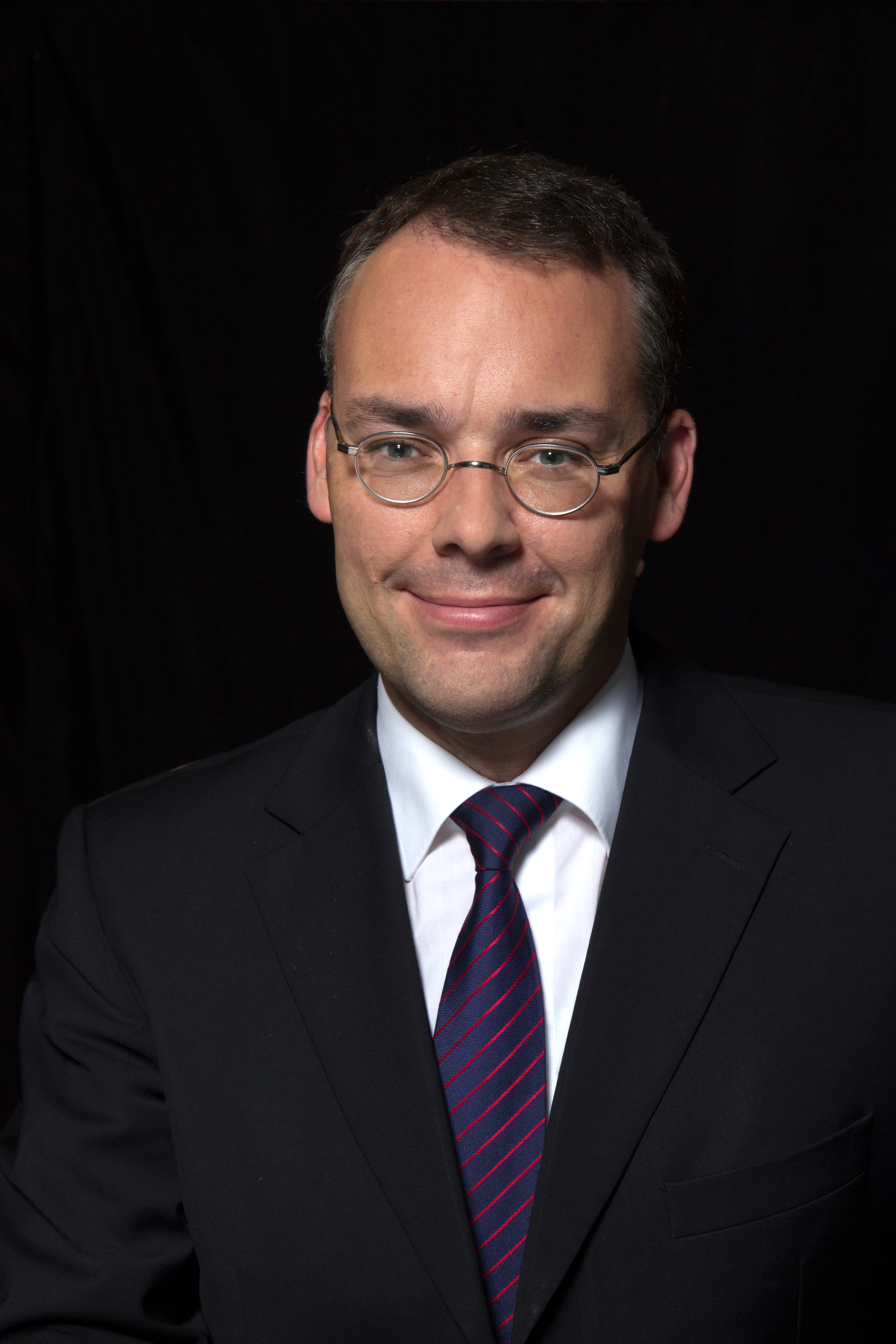 Information Wikipedia im Landtag – Baden-Württemberg 15.–16. Mai 2013 in Stuttgart Fragen zur Nachnutzung Wenn Sie Fragen zur Nachnutzung dieses Bildes haben, können Sie sich jederzeit gern an wenden |Source=Own work |Permission= |other_versions= Peter Friedrich